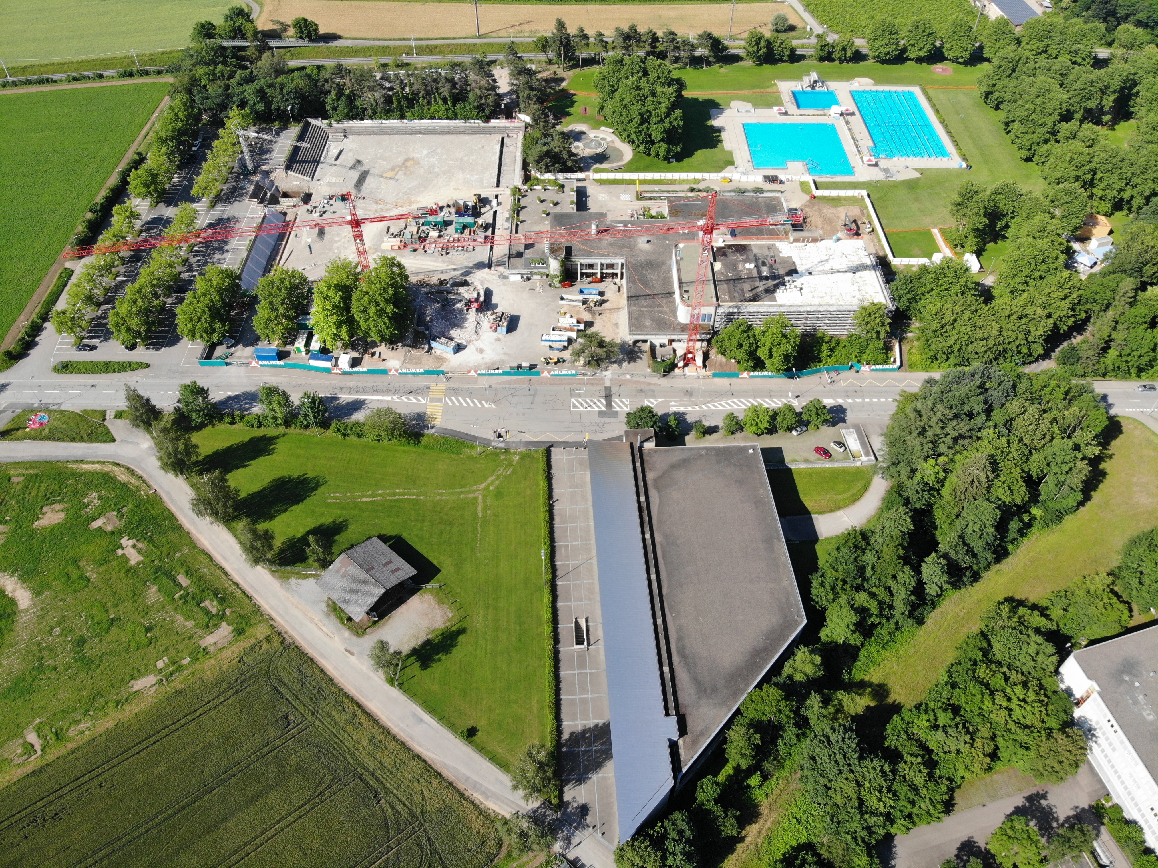 Das Tägi während der Sanierung kurz nach dem Abbruch des Personalhauses